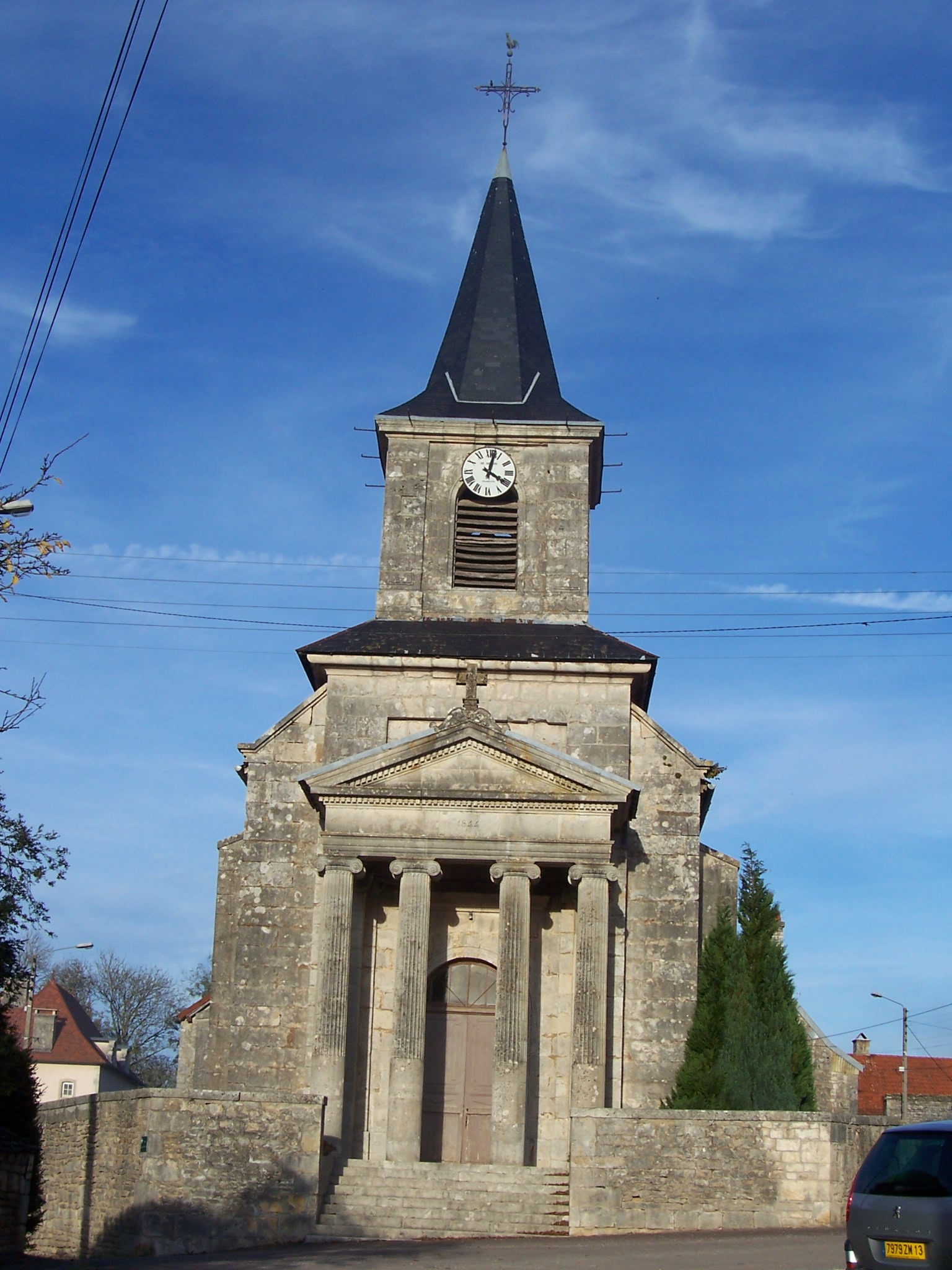 Eglise St Leger 1790 (inscrite à l'inventaire des monuments de France)